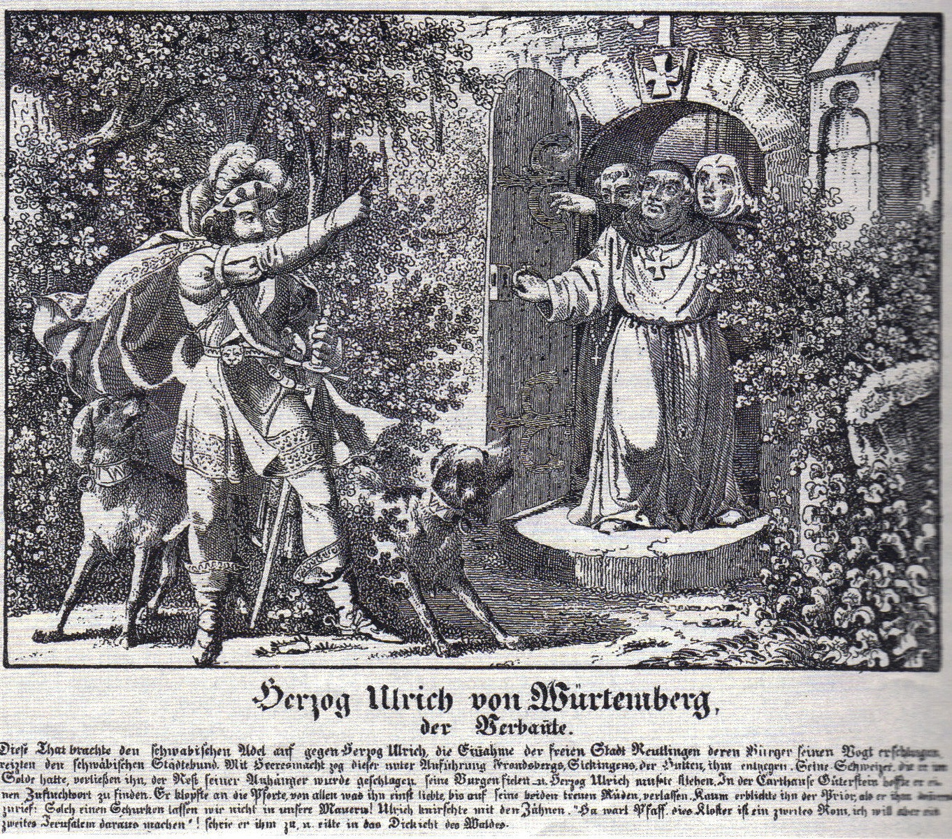 Herzog Ulrich der Verbannte, Lithographie Verlag Johannes Hohloch Reutlingen